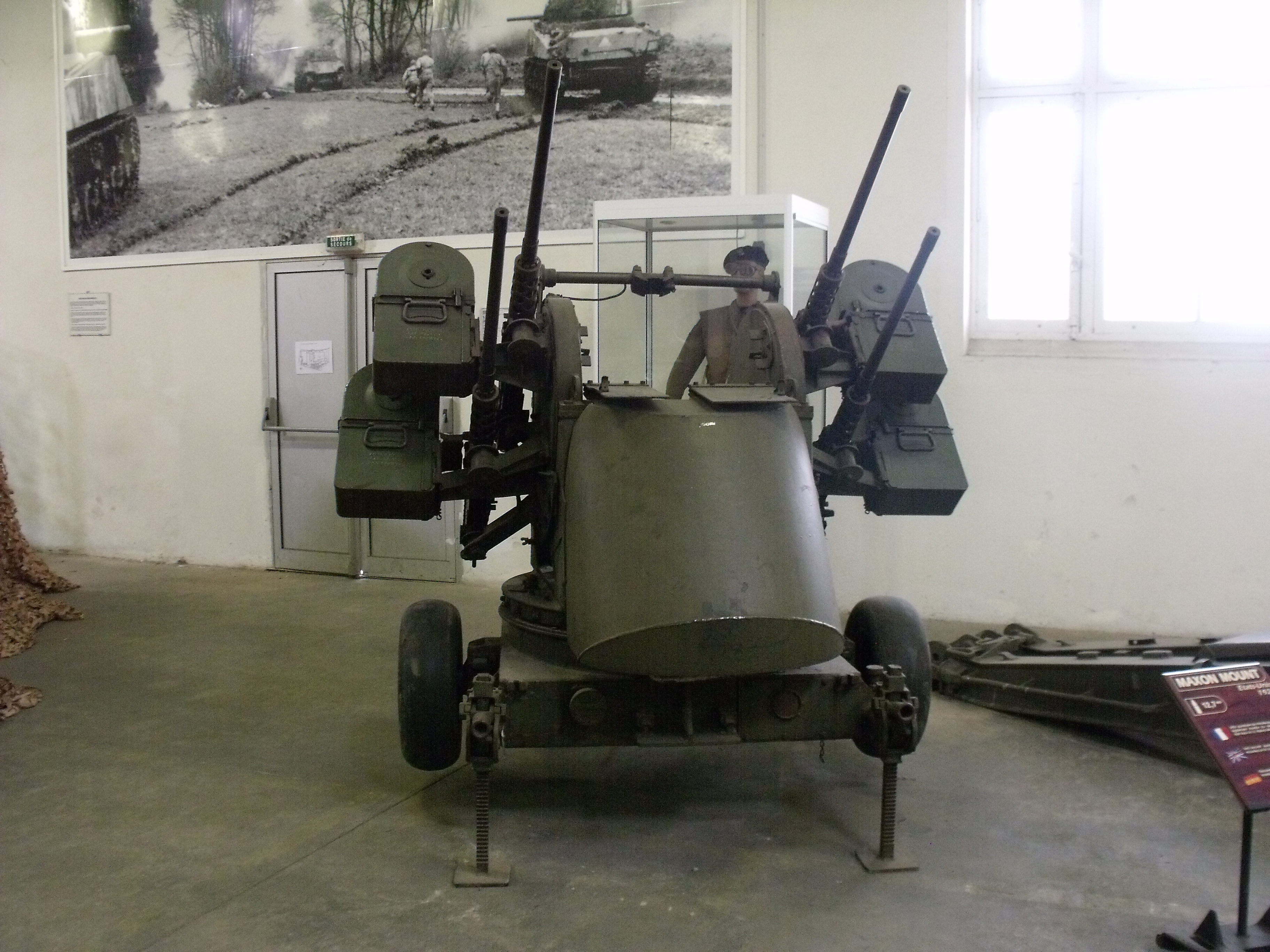 Montaje antiaéreo Maxon